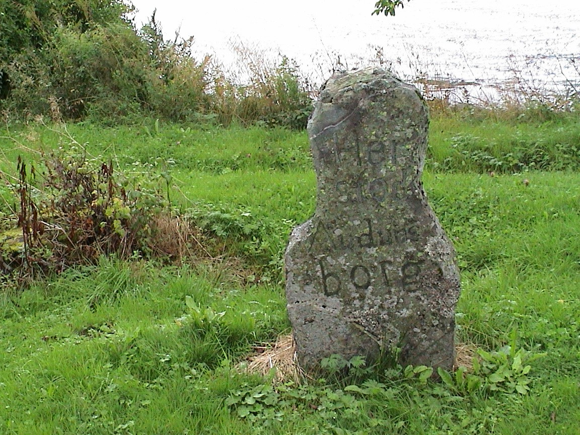 Minnesmerke etter Audun Hugleikssons borg